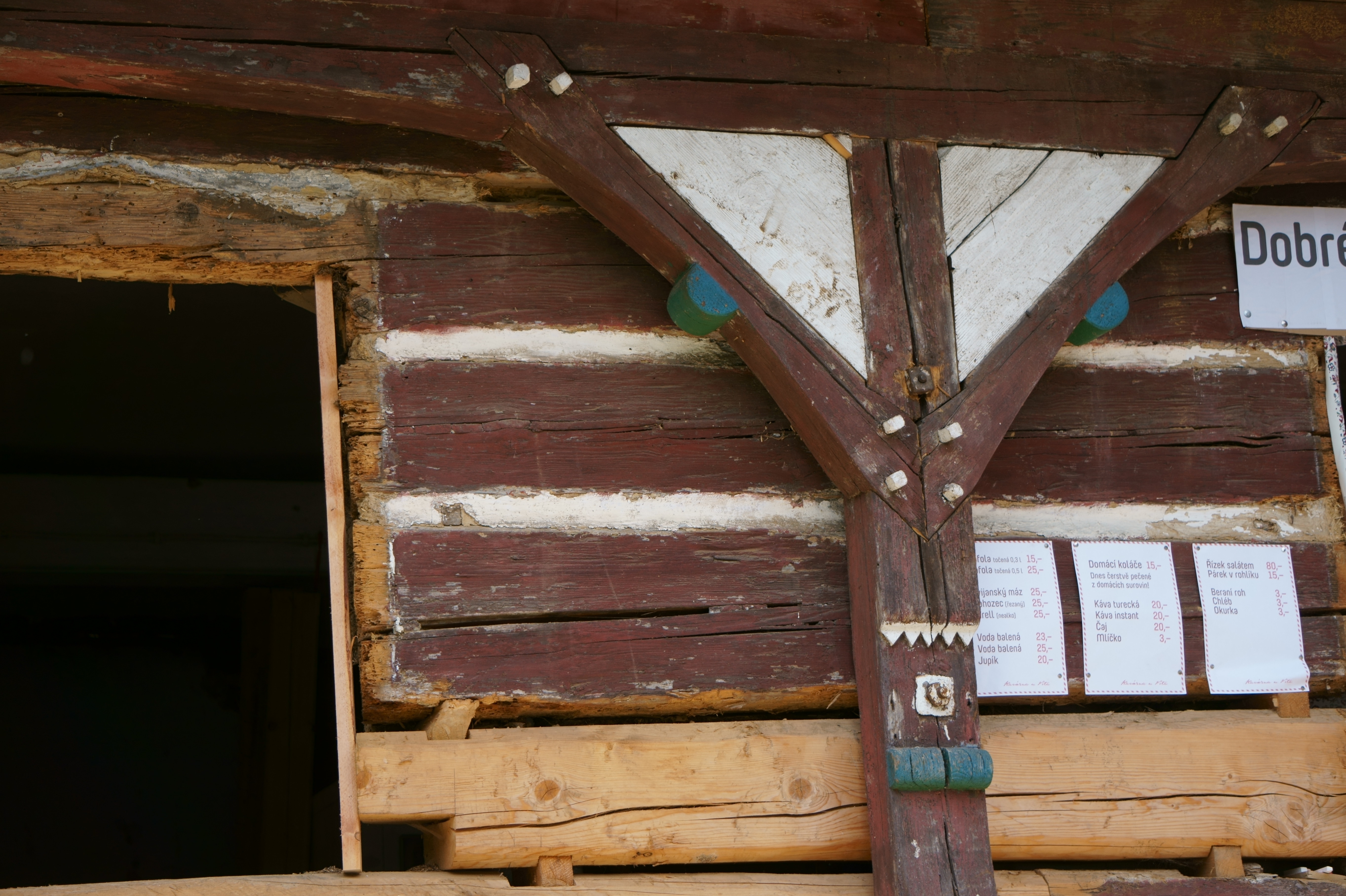 Trávníček če. 14 - detail podstávky. Foceno v průběhu akce Beranovy hody 2017.